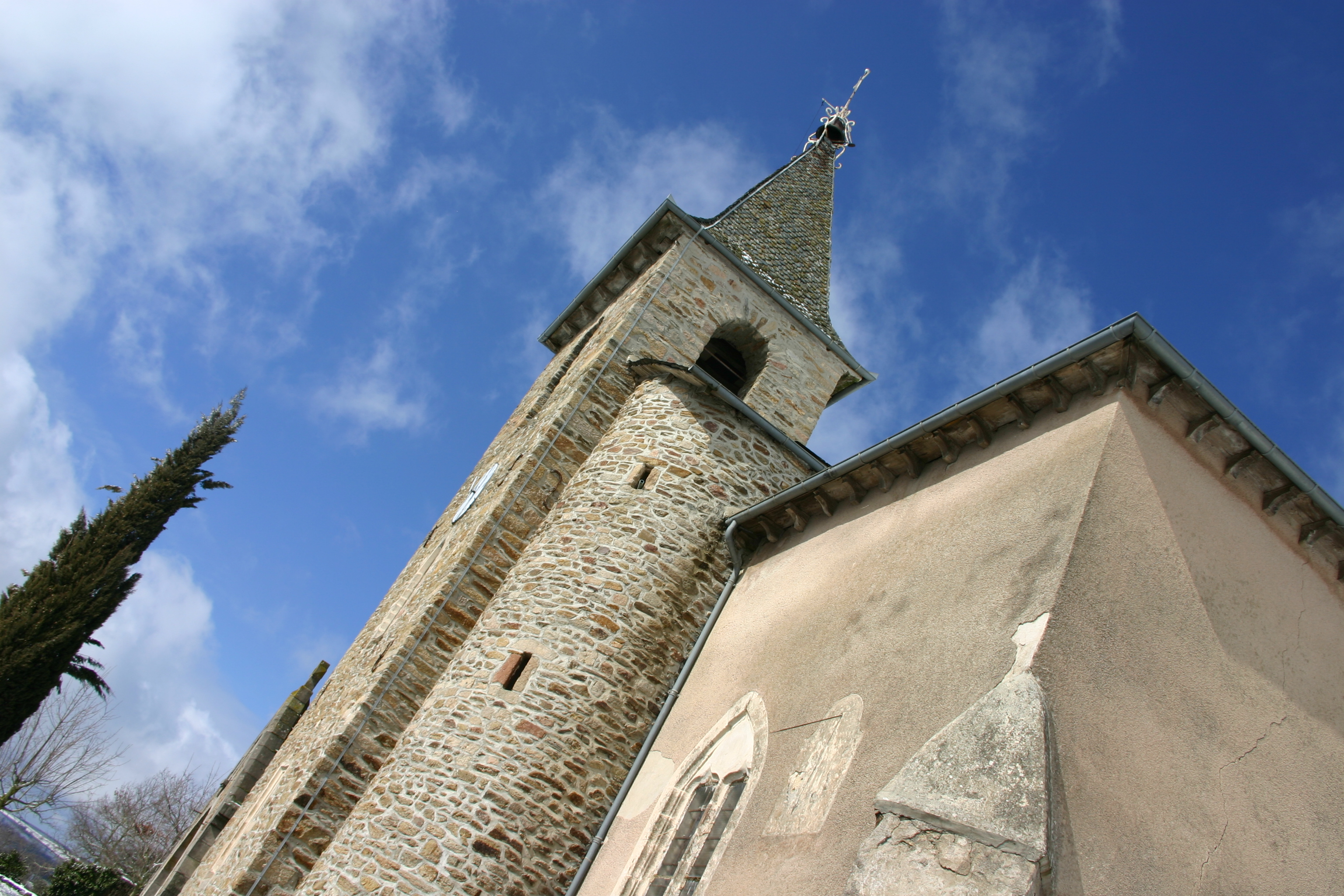 Église de Bégon - La Selve (Aveyron)